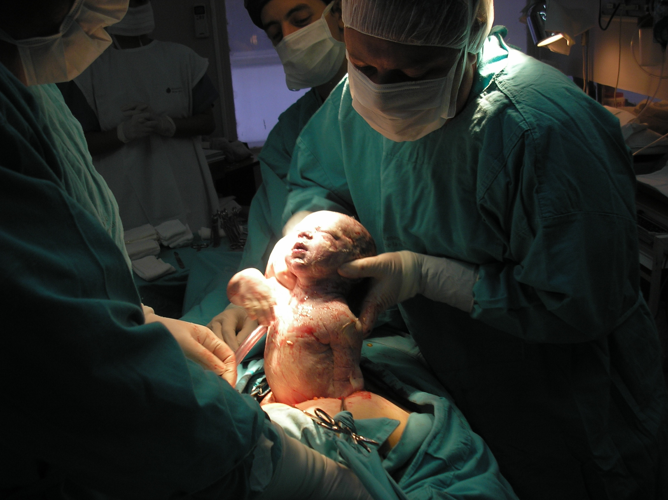 Imagen de una cesárea.